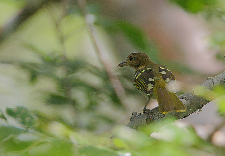 A skulking resident of gallery forest. Image taken in Arabuko-Sokoke forest.